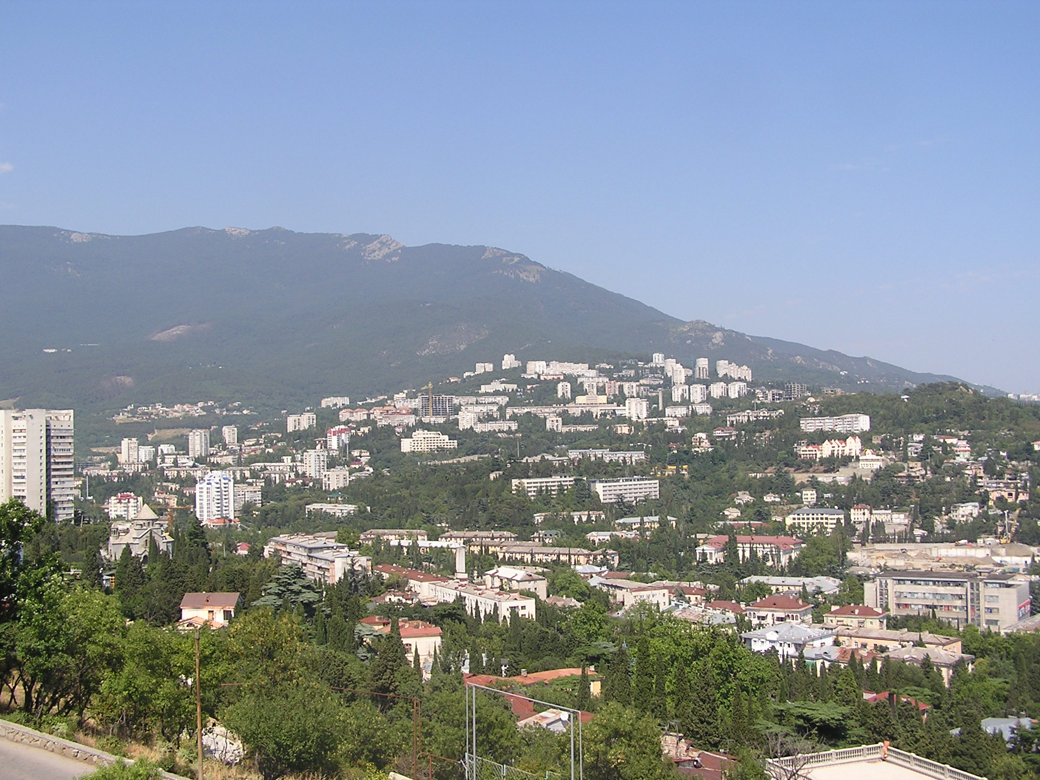 Ялта